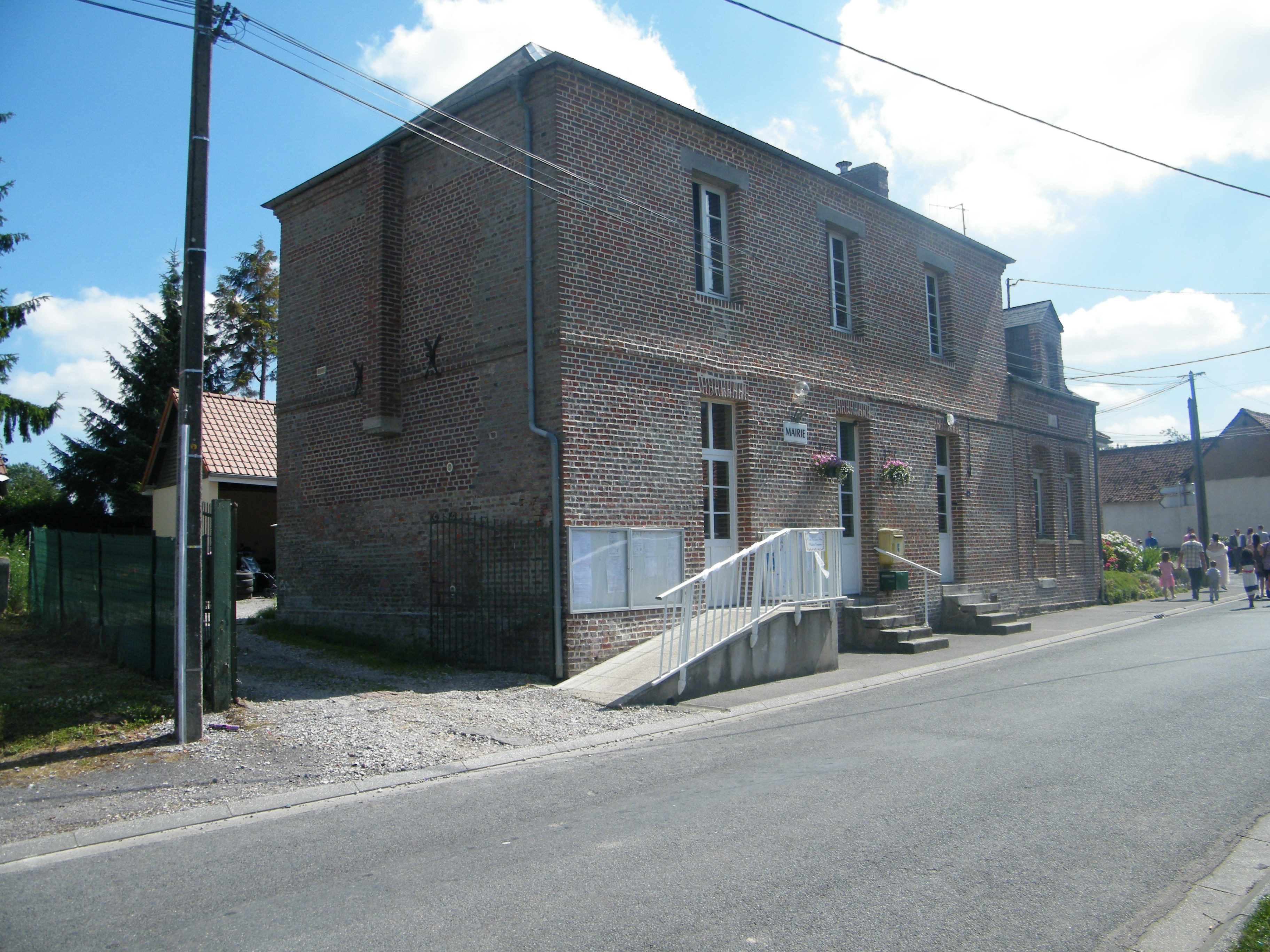 Doudelainville, Somme, France, mairie-école